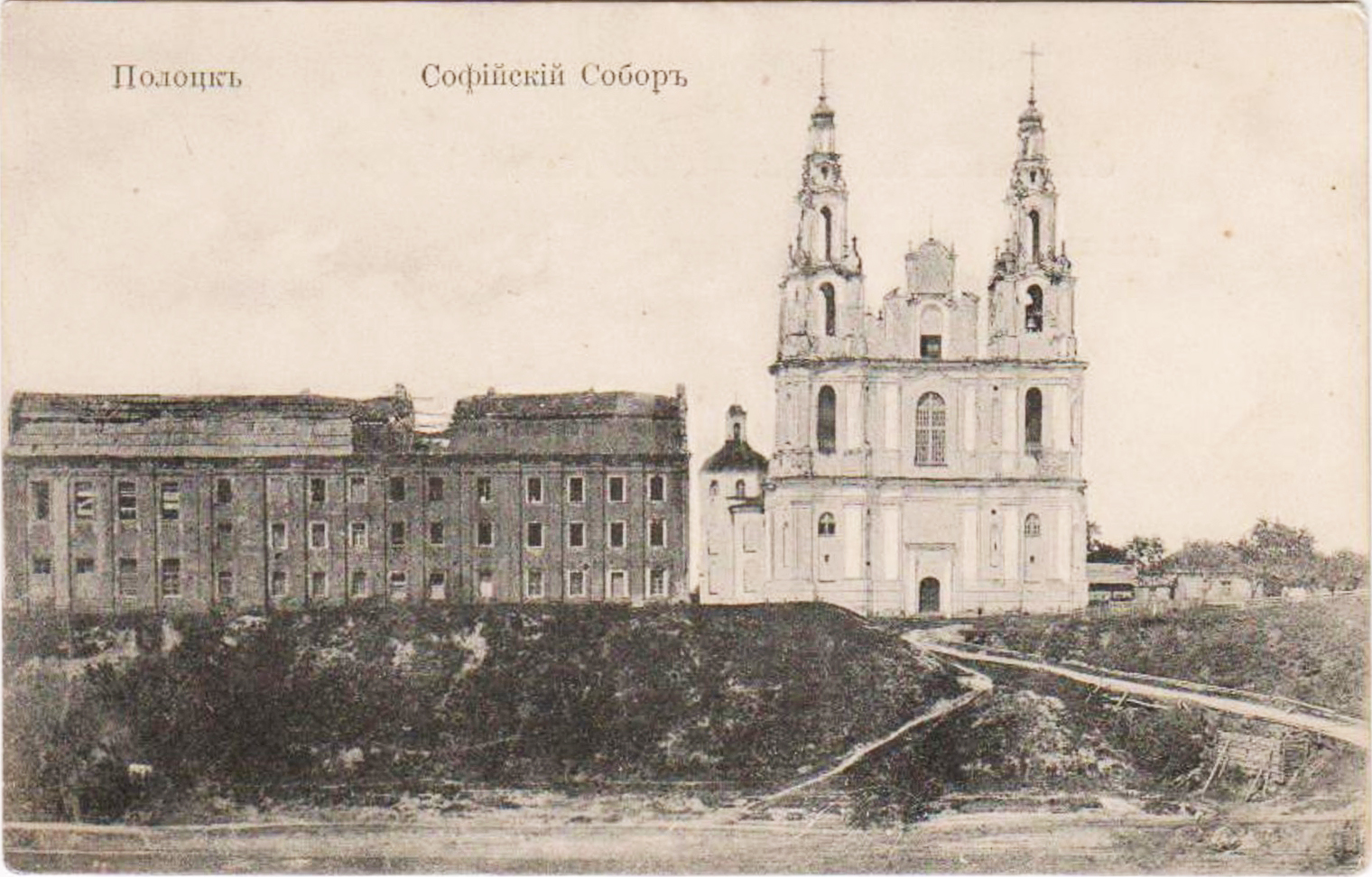 Беларуская (тарашкевіца): Полацак (Połacak), Верхні Замак (Vierchni Zamak). Царква саборная Сьвятой Соф'і і манастыр базылянаў